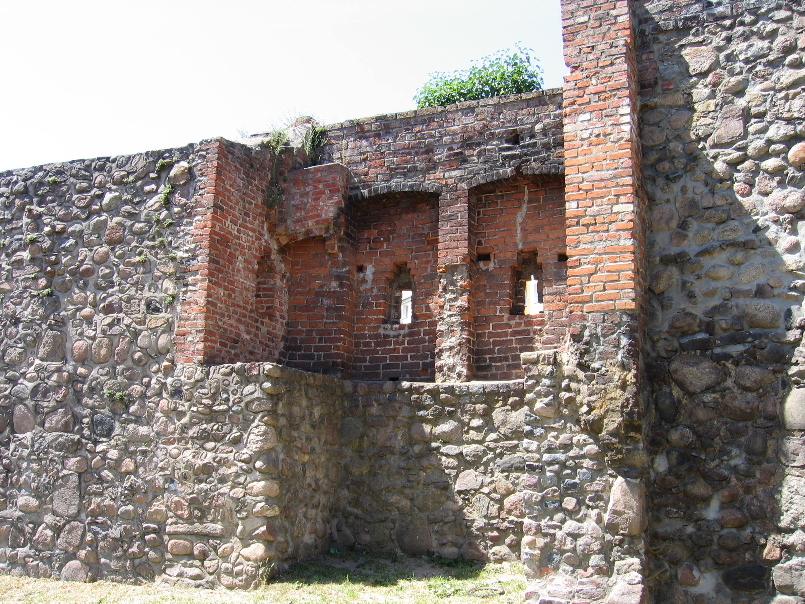 Barlinek - obwarowania miejskie